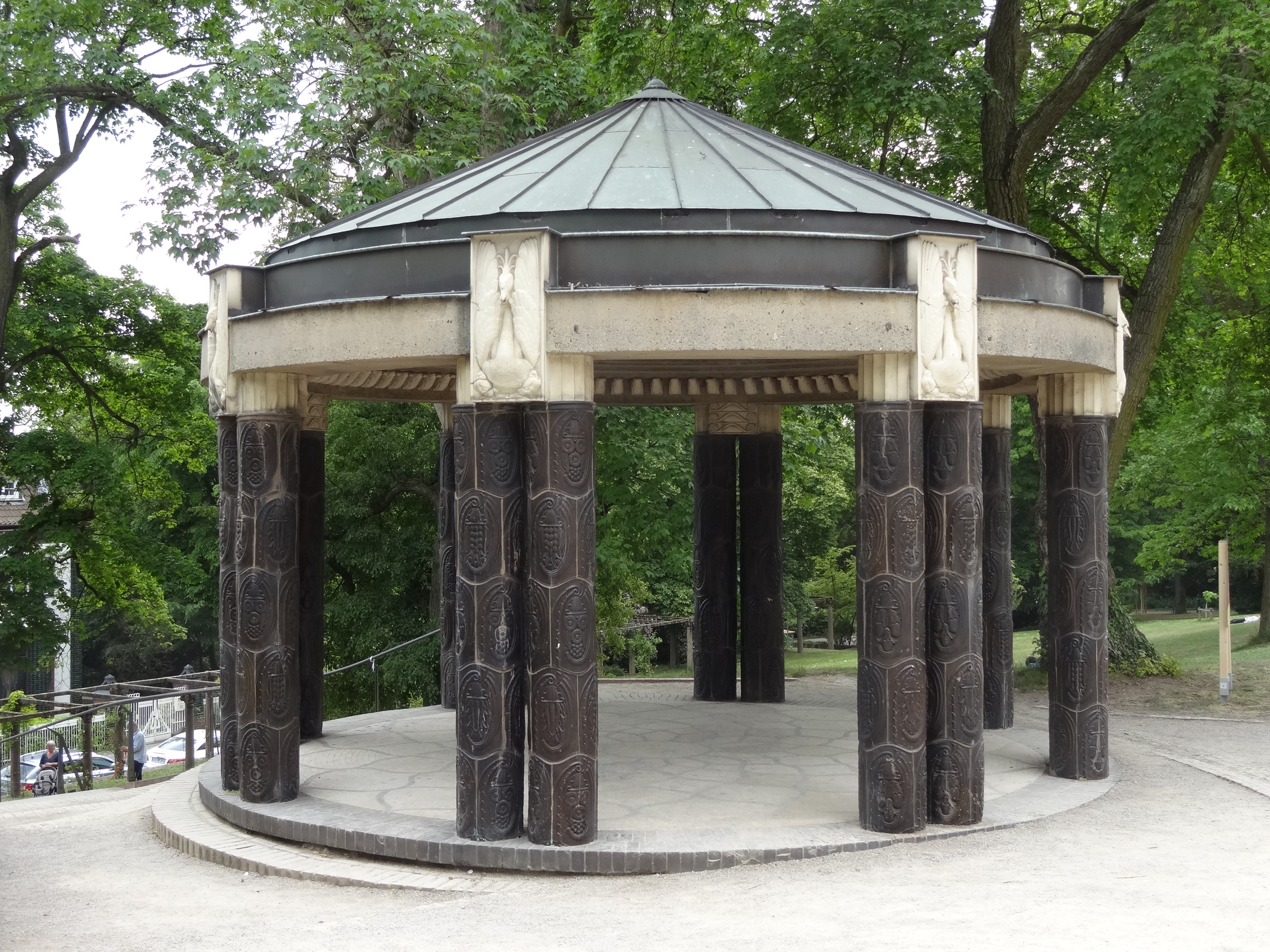 Schwanentempel